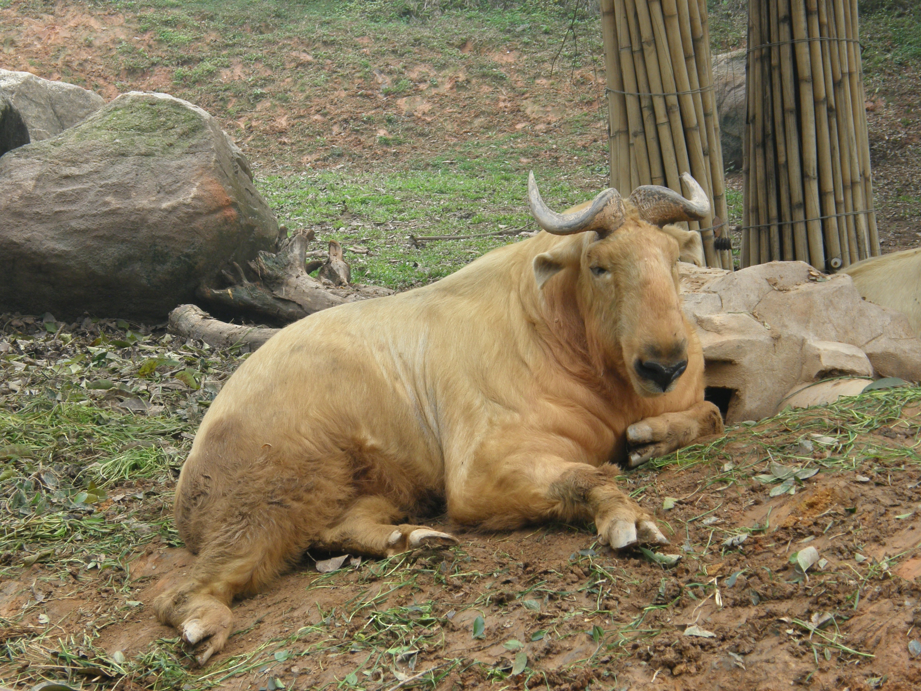 Такин в зоопарке Гуанчжоу, февраль 2012